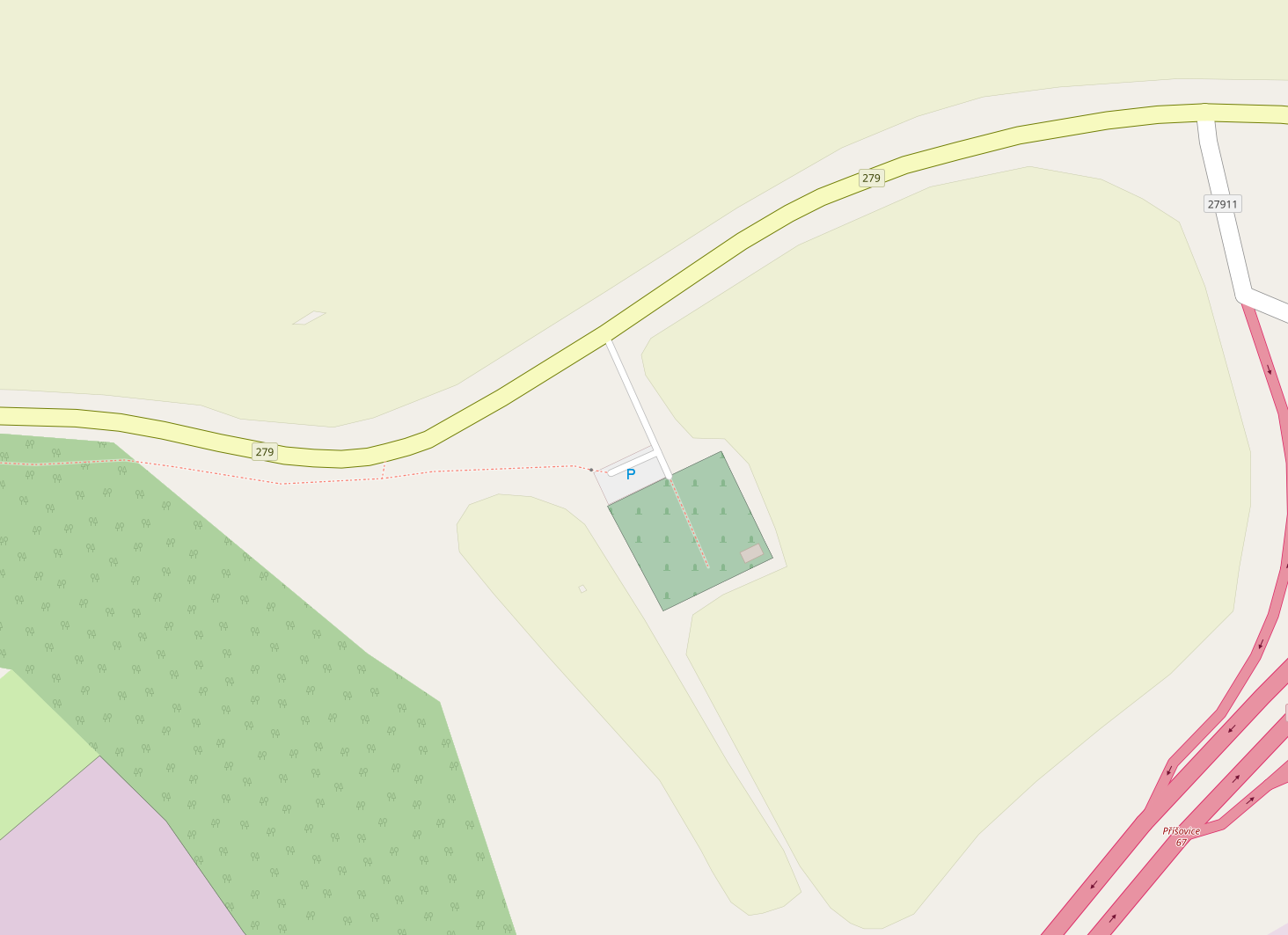 Mapa znázorňující poslední místo výskytu pohřešované Ivany Koškové.